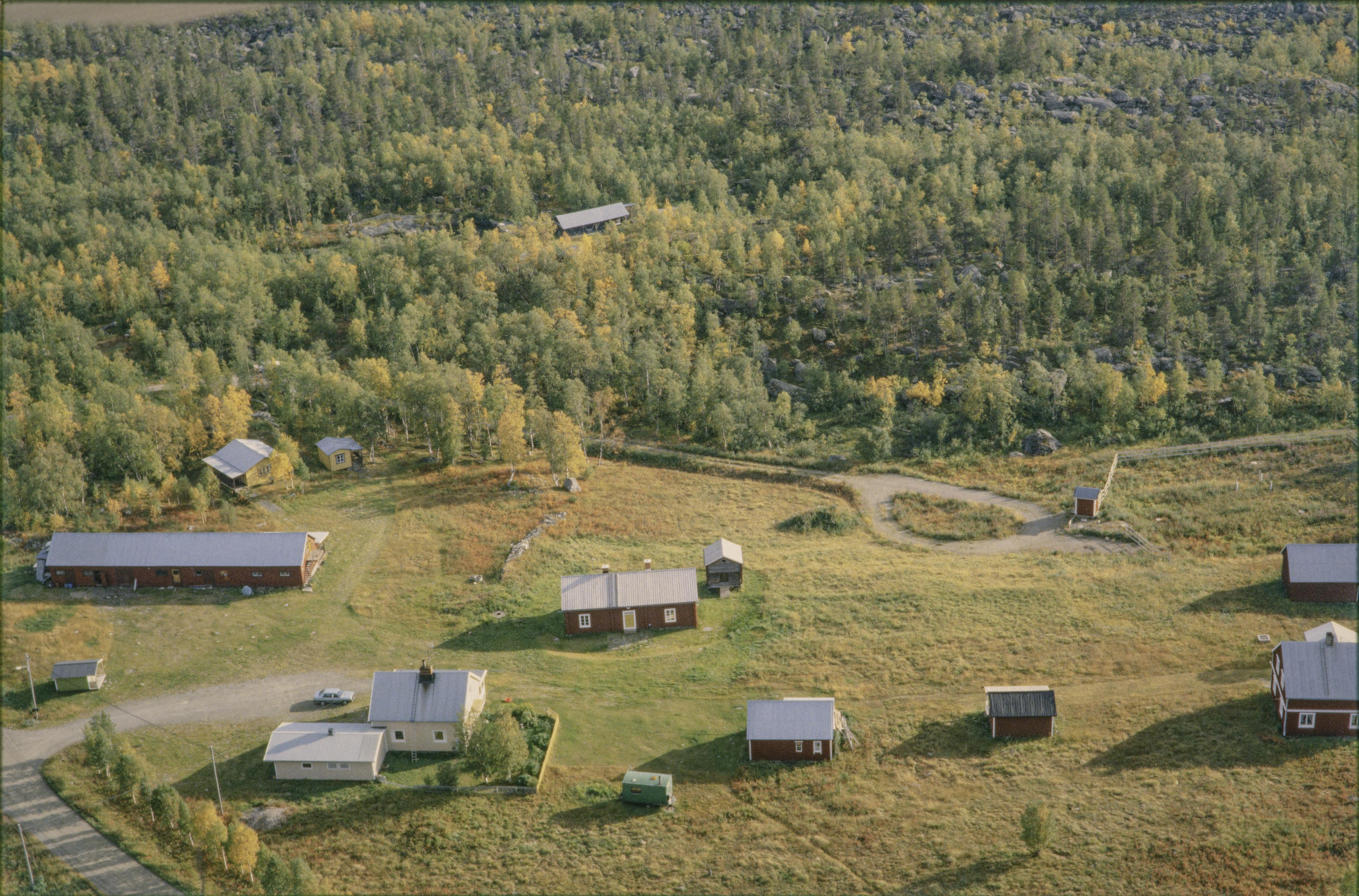 Motiv: Adolfsström Nyckelord: Flygbilder, Riksintressen Kategori: Nybyggargård/fjällägenhetAdolfsström.